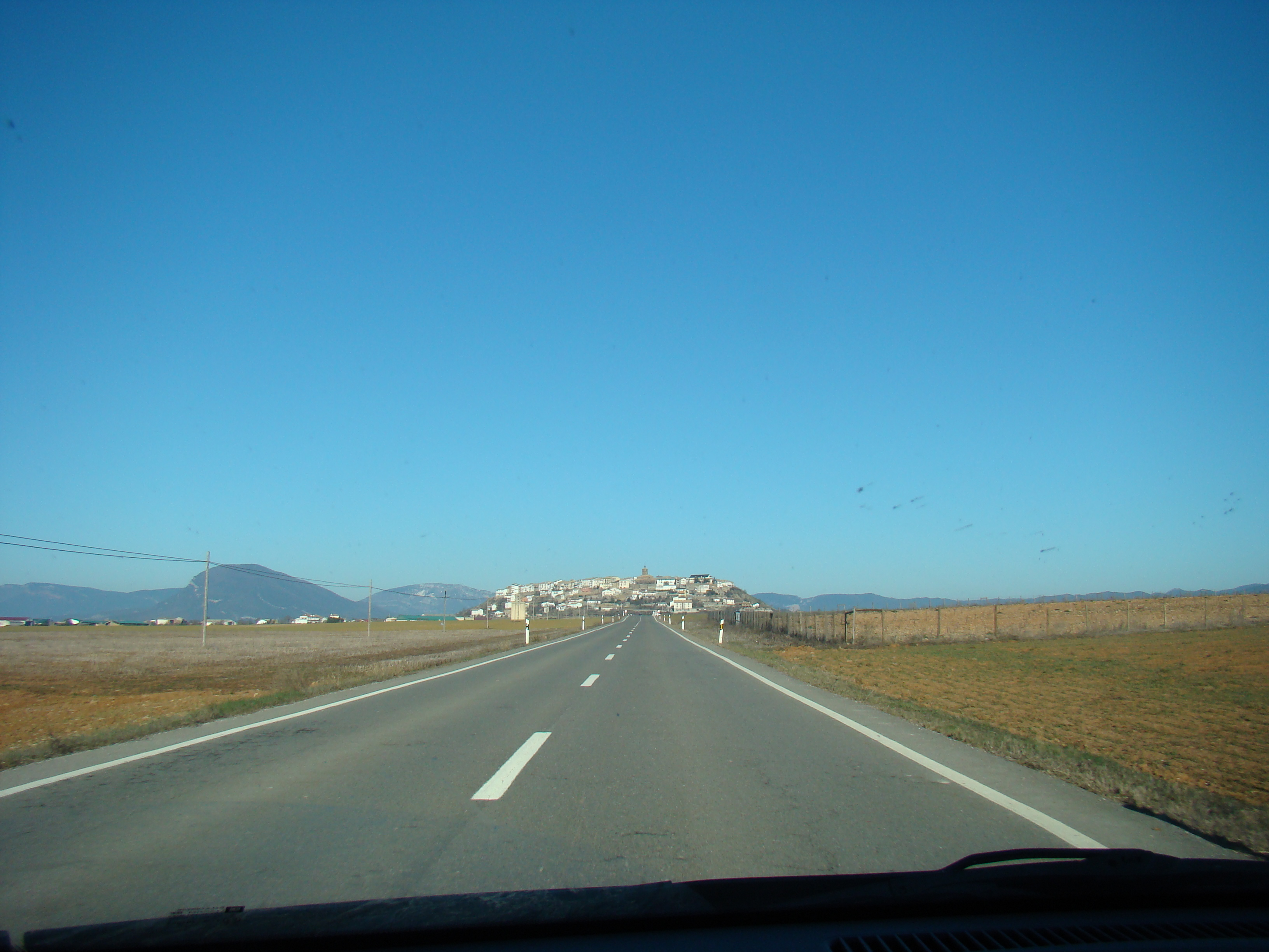 Berdun